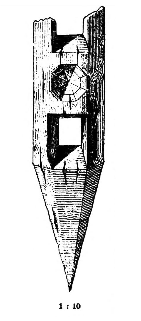 Raetischer Limes, Bayern: Wp 13/54 mit Altmühlfurt. Aufnahme der Untersuchungen vom Spätherbst 1895.